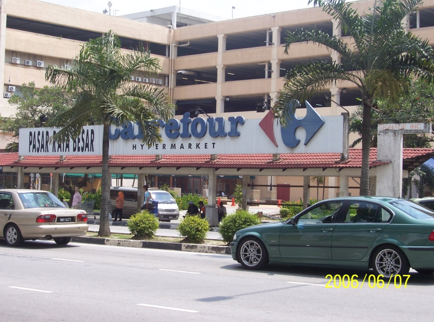 梳邦在也家乐福商场门外，照片是敝人在2006年拍摄的。